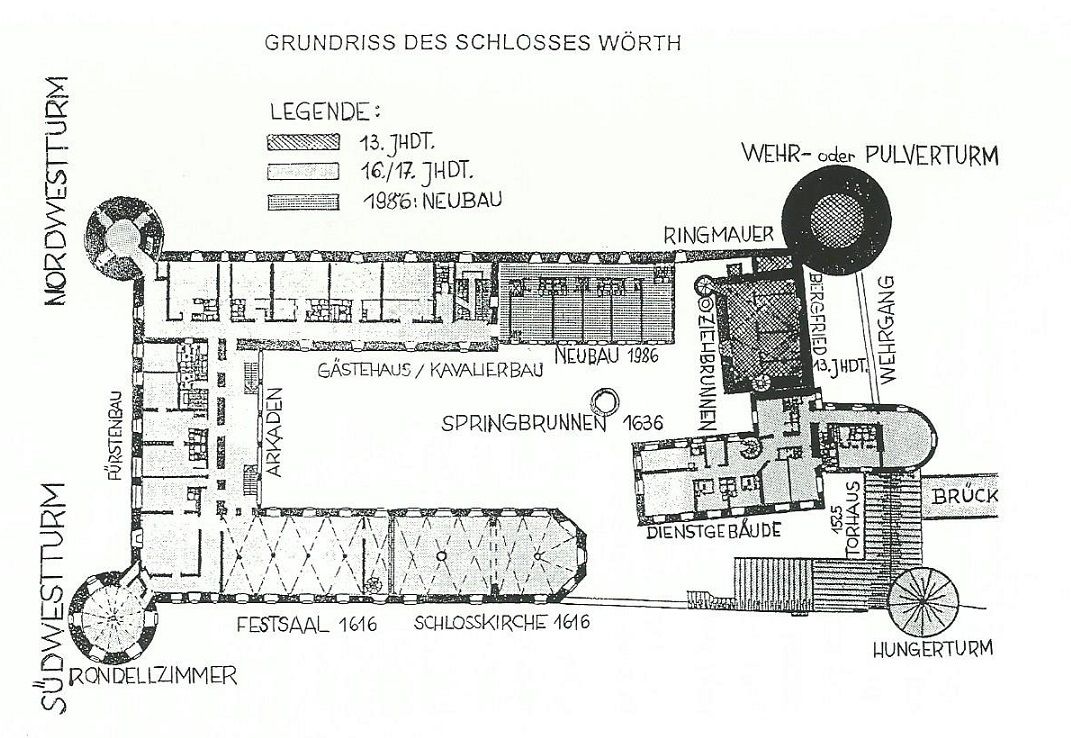 Grundriss Schloss Wörth an der Donau